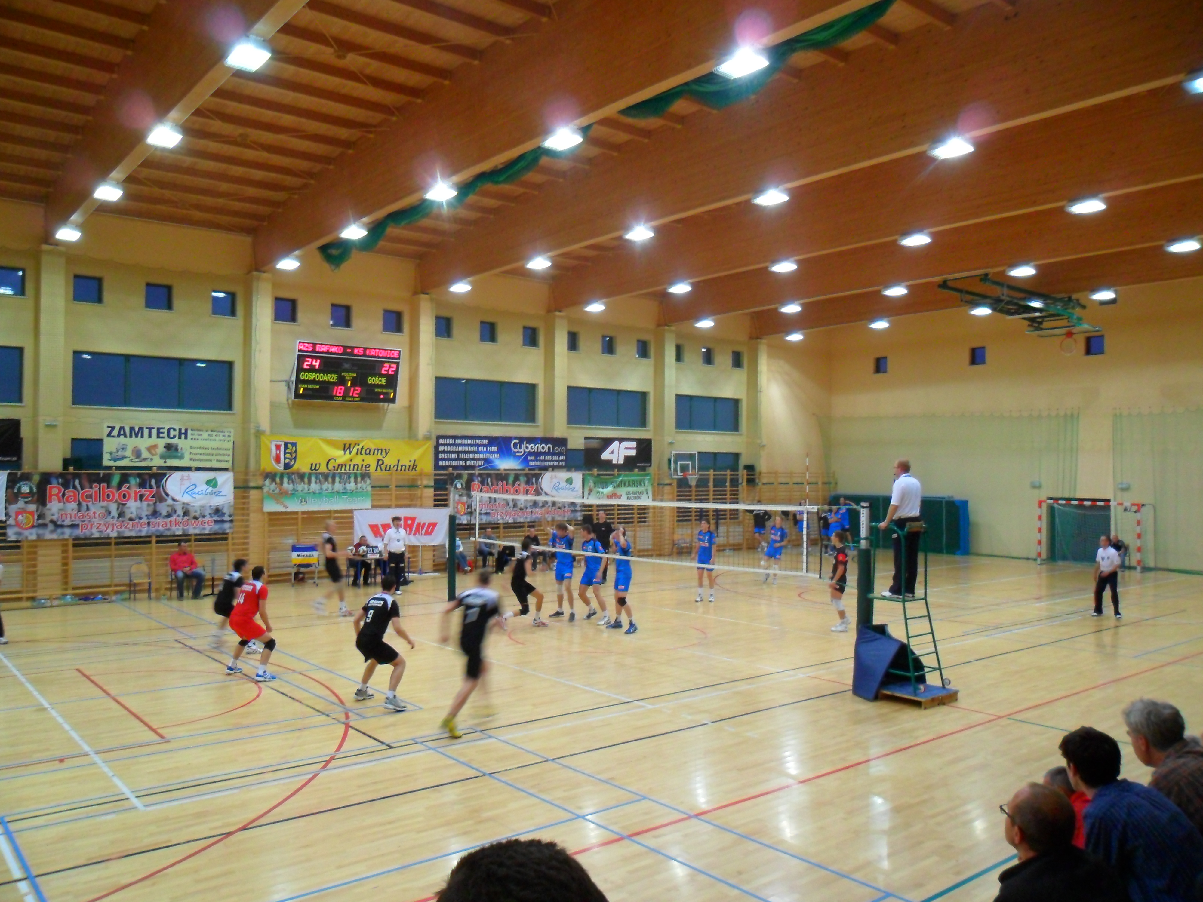 Hala sportowa w Rudniku – mecz II ligi siatkówki (trzeci poziom rozgrywkowy) pomiędzy AZS Rafako Racibórz (niebieskie stroje), a KS Spodek Katowice, wygrany przez Rafako 3:2 (15 października 2011).